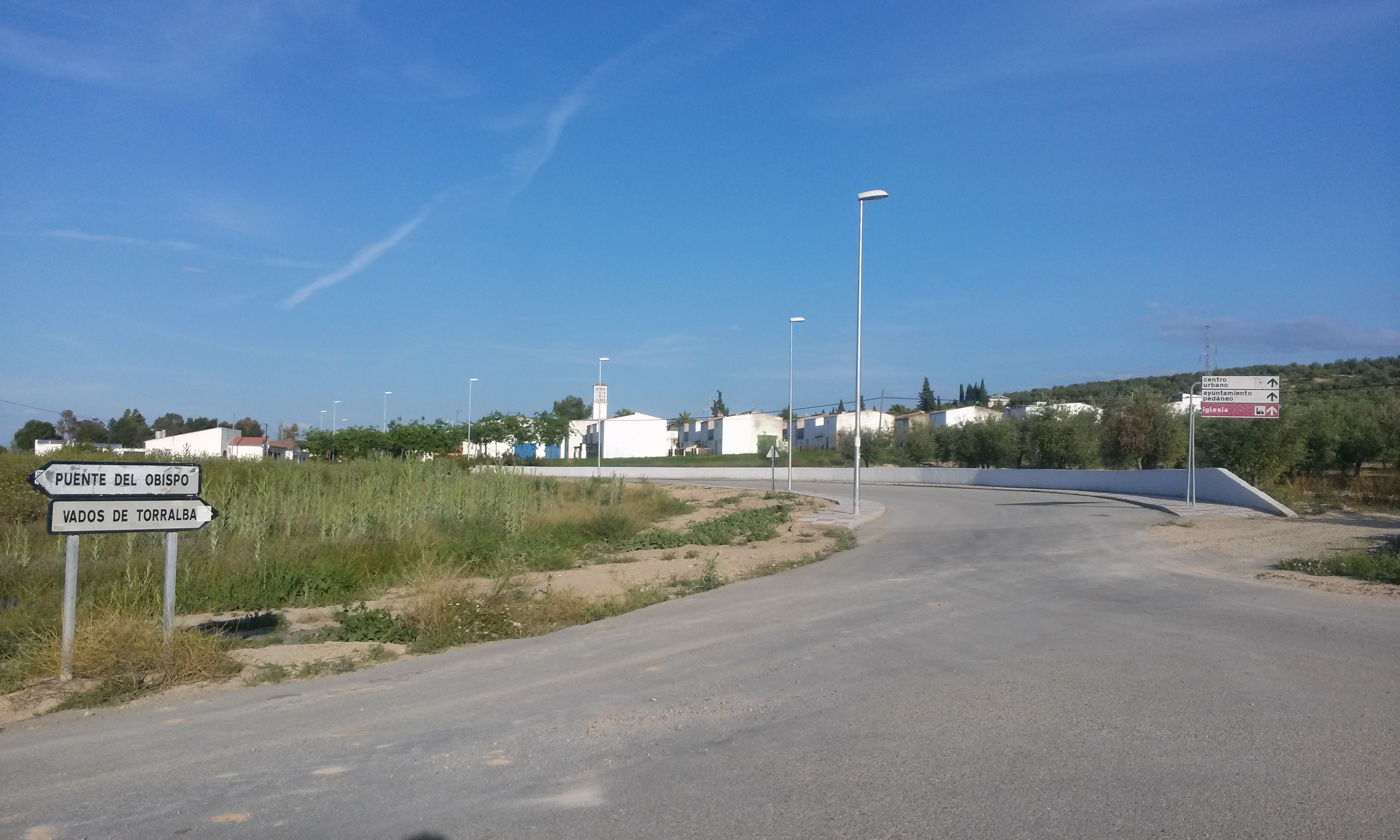 Cruce de caminos junto a Vados de Torralba.